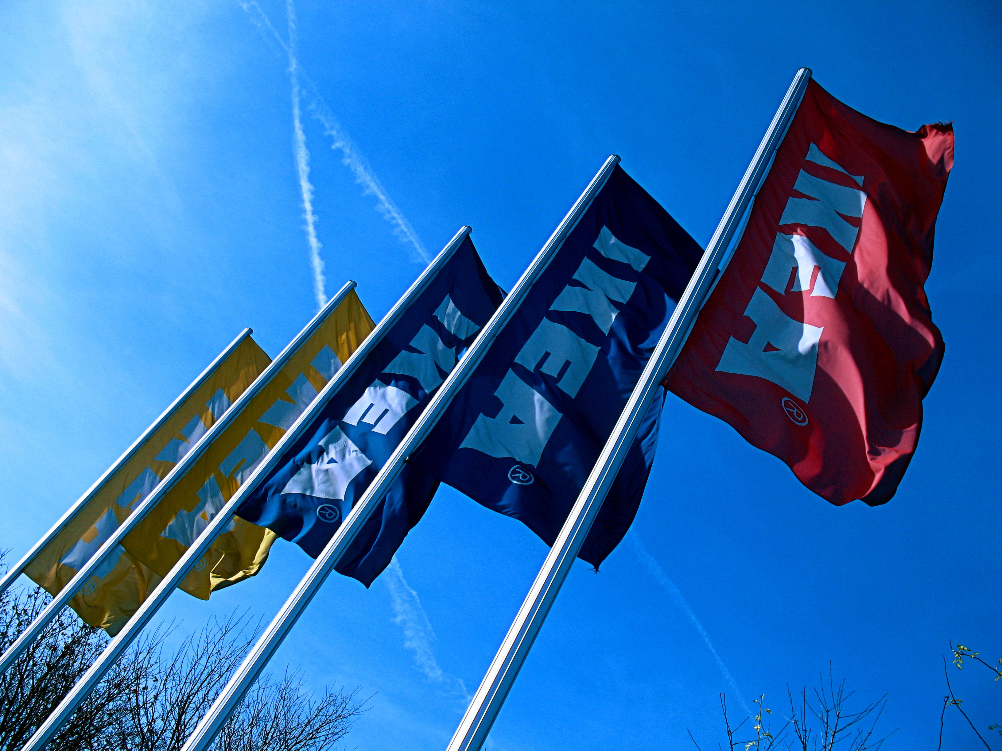 Ikea-Fahnen im Wind, München-Eching